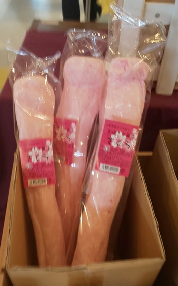 静岡県内のお土産店にて販売されていた物